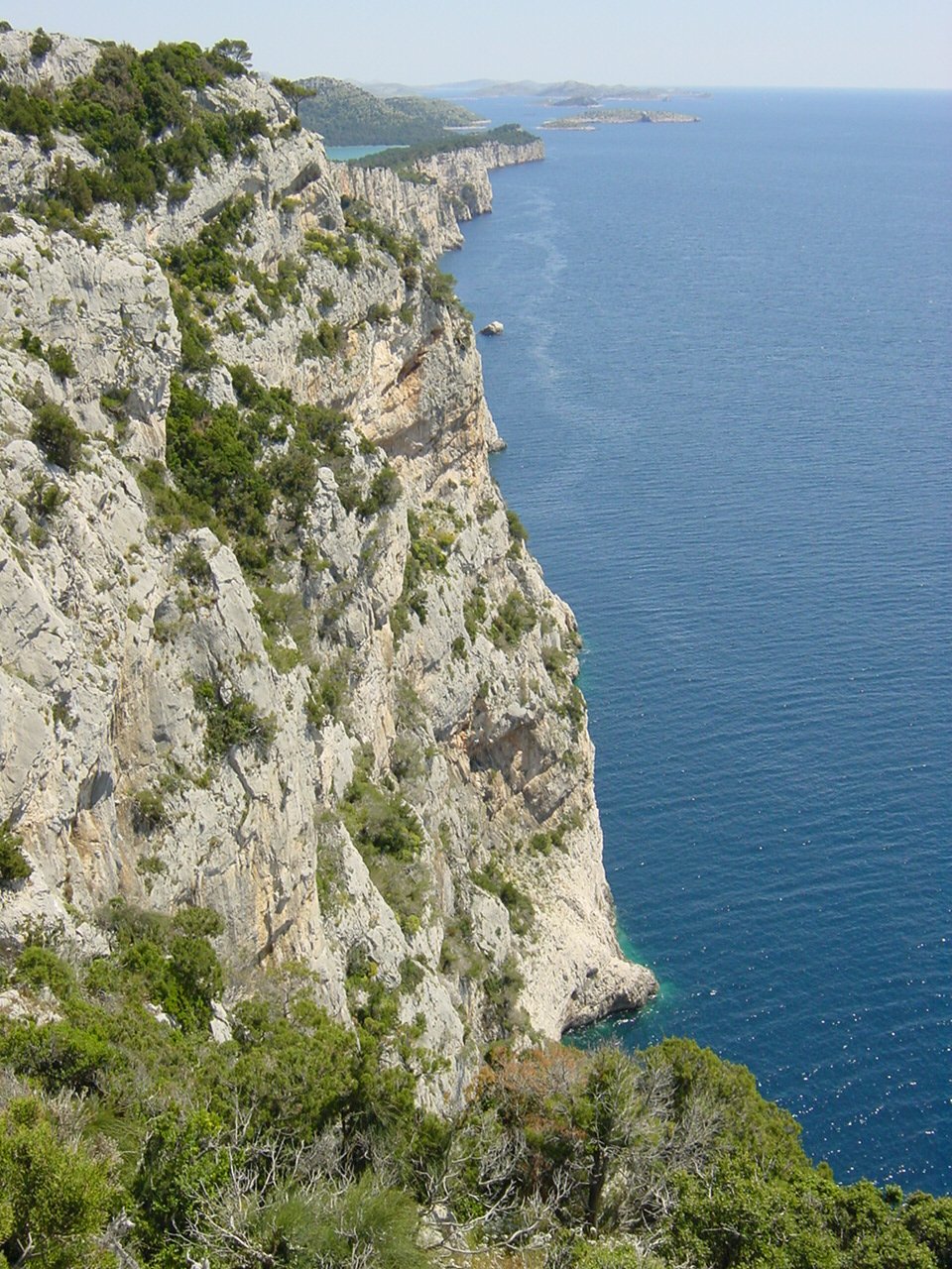 Die Steilklippe an der Westküste von Dugi Otok, hinten links ein Stück des Salzsees im Naturpark Telascica.